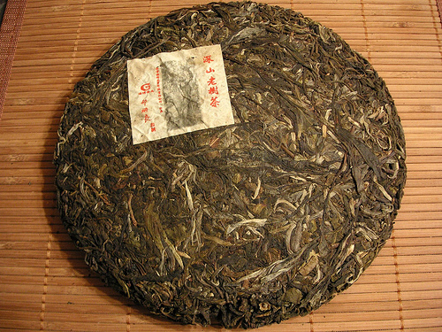 Haiwan 2005 raw pu-erh bingcha.